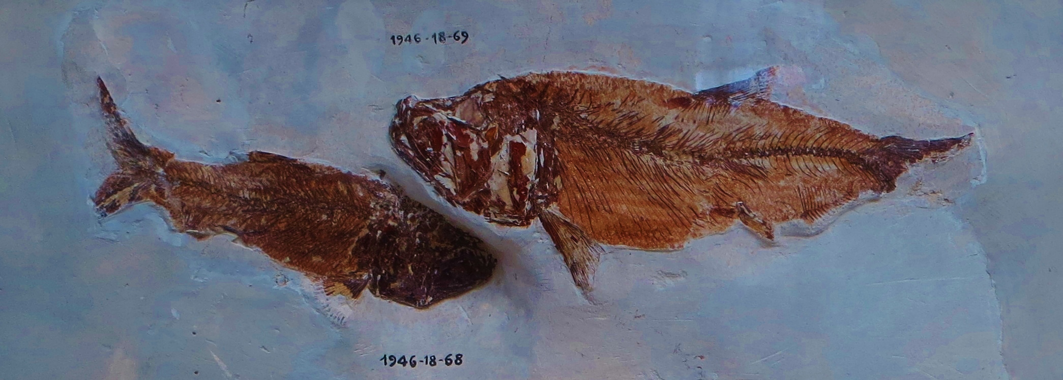 Fossil of Spaniodon, an extinct fish- Took the photo at Musee d'Histoire Naturelle, Paris